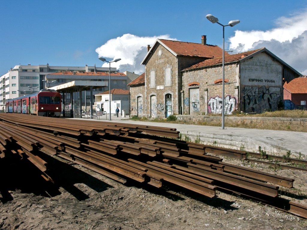 Tipo: E [Estação] Local: Espinho [Linha do Vouga, PK 1] Data e hora: 16 de Junho de 2008 [17h03] à esquerda: Tipo: Comboio Regional 5212 [Espinho - Oliveira de Azeméis] Material: Automotora 9635 [Unidade Dupla Diesel - Via Estreita] esta fotografia foi publicada, sem creditação de autor (tal como não deve ser feito, segundo a licença Creative Commons que lhe está aplicada), no vídeo Património Ferroviário Abandonado (minutagem: 3'18 a 3'22).